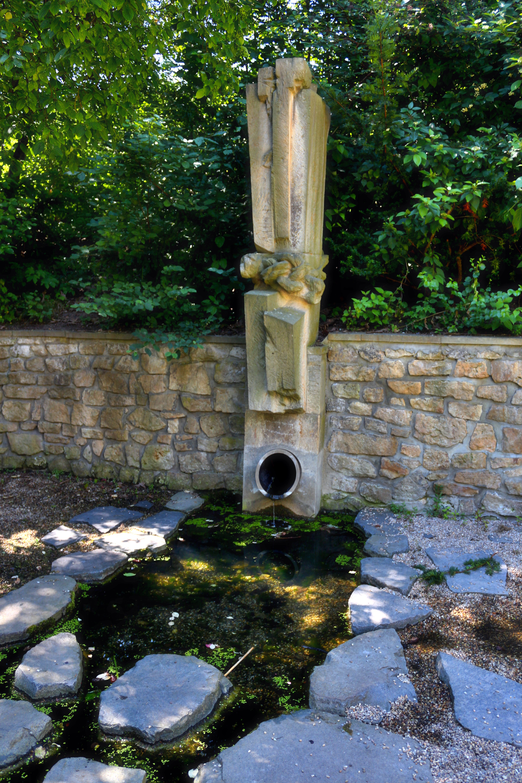 Praha-Stodůlky, pramen Prokopského potoka